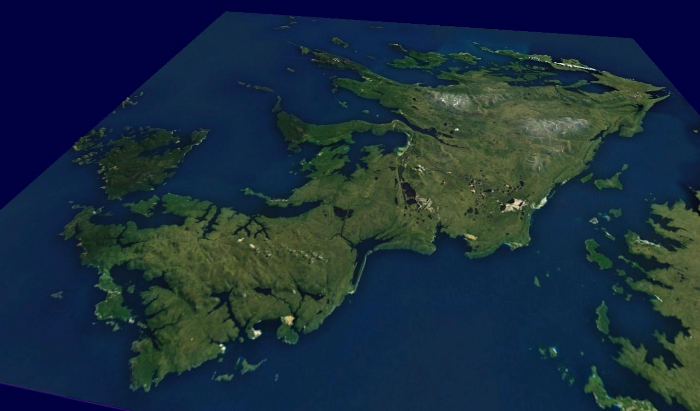 Insula Falkland de Vest 3D. Imagine realizata cu date SRTM furnizate liber de NASA.